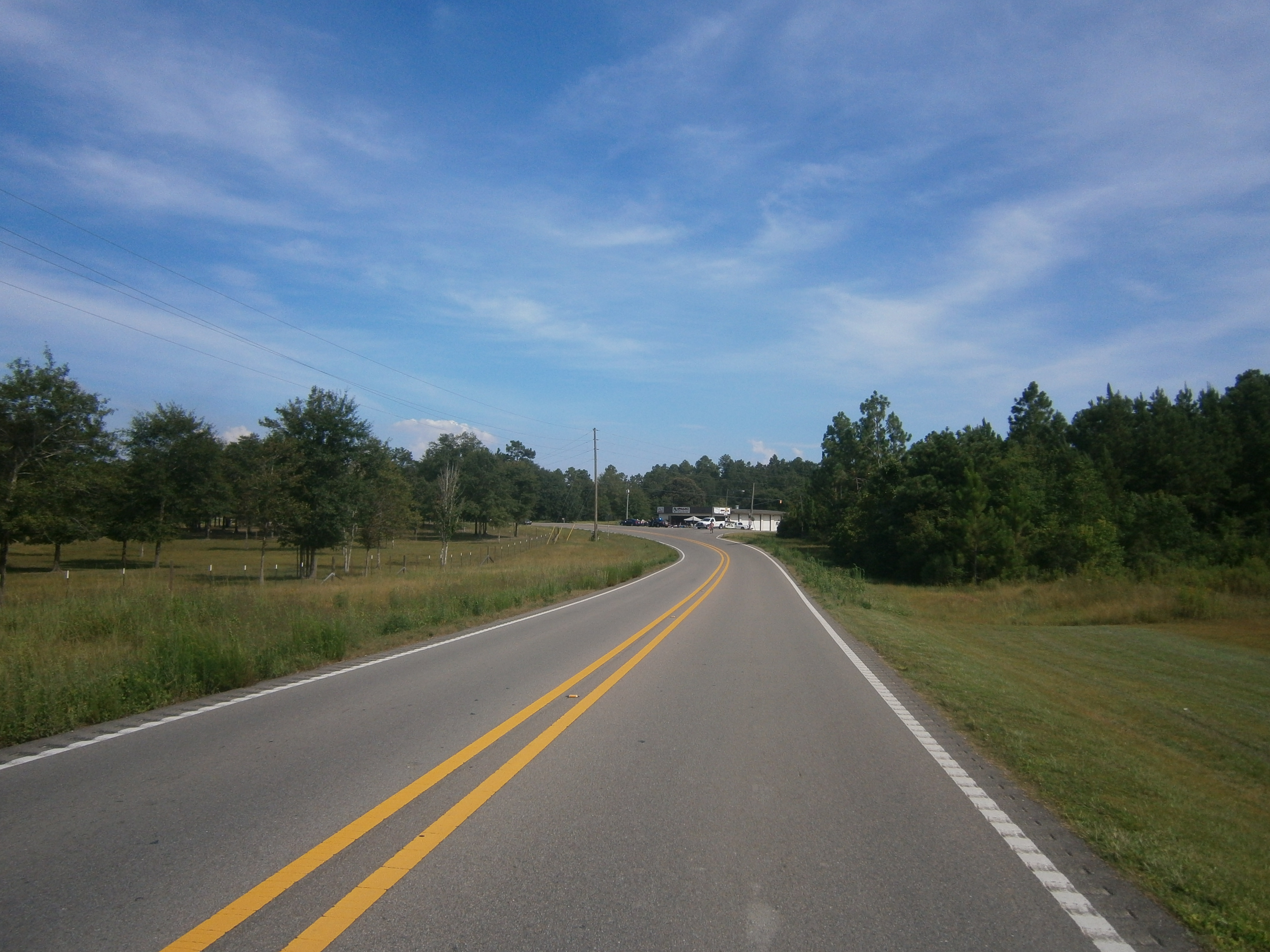 Highway 53 in Lizana